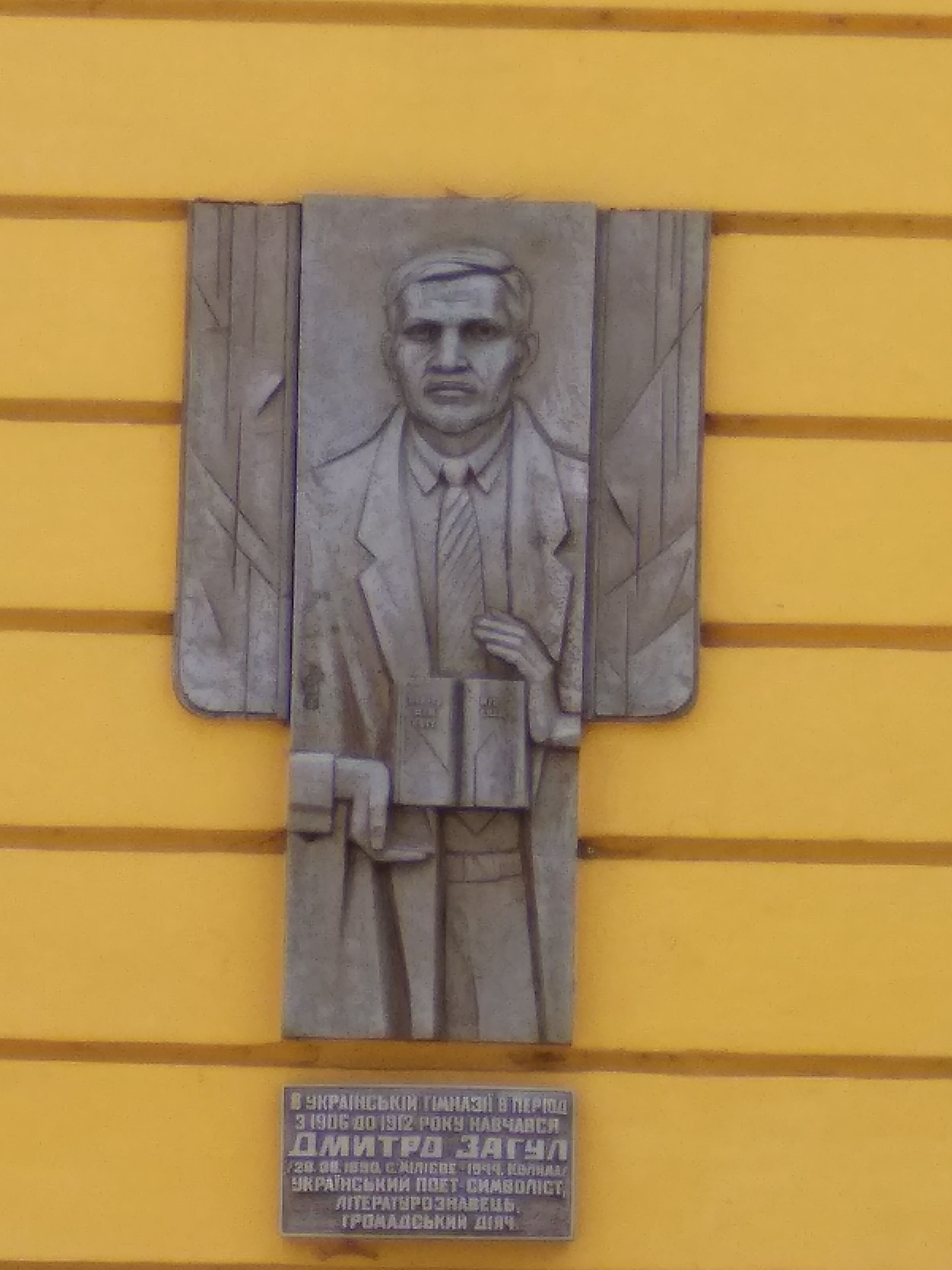 Німецько-українська гімназія, де навчалися видатні діячі революційного руху на Буковині, Чернівці, вул. Д. Загула, 8